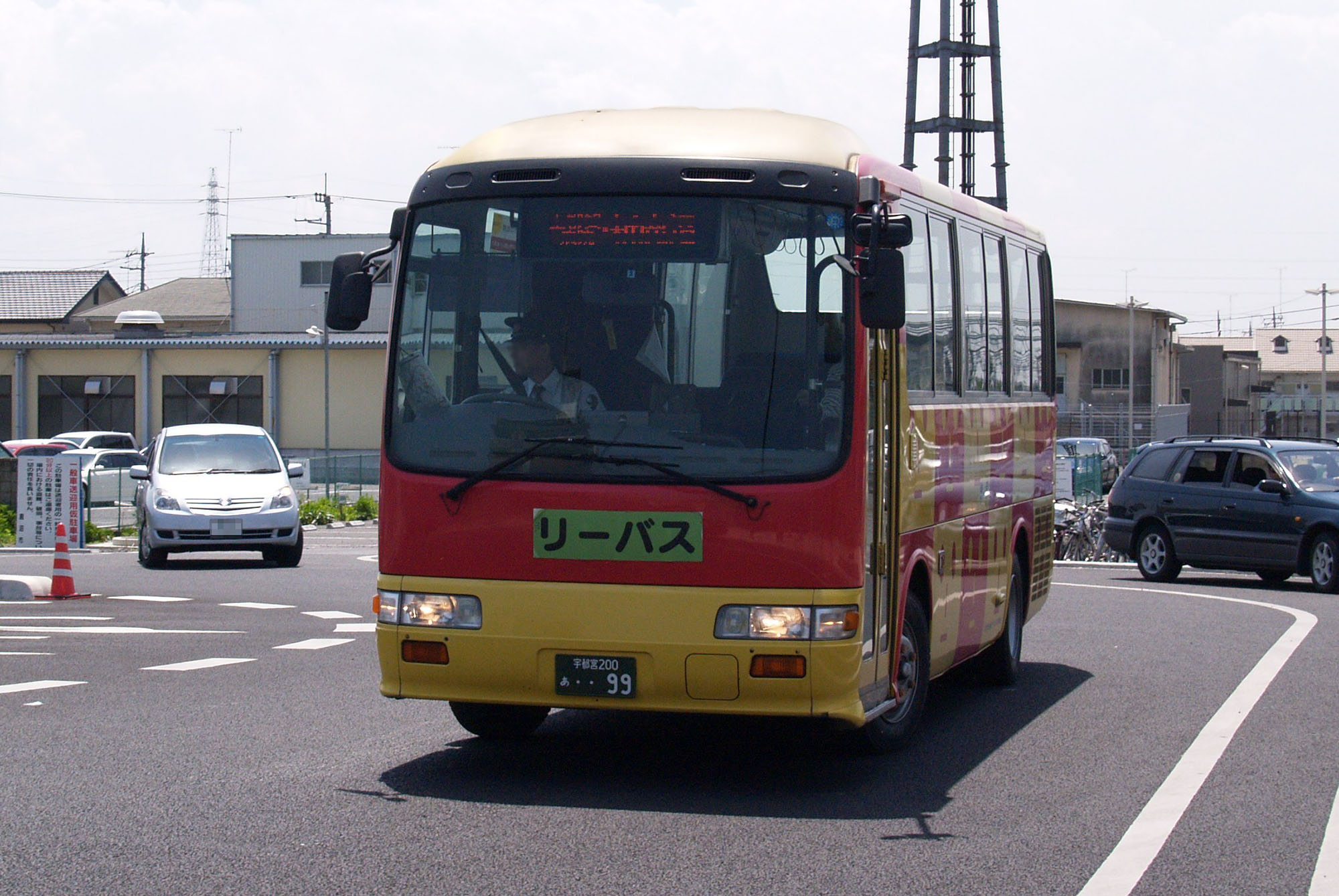 鹿沼市民バス（リーバス。新鹿沼駅前にて撮影）